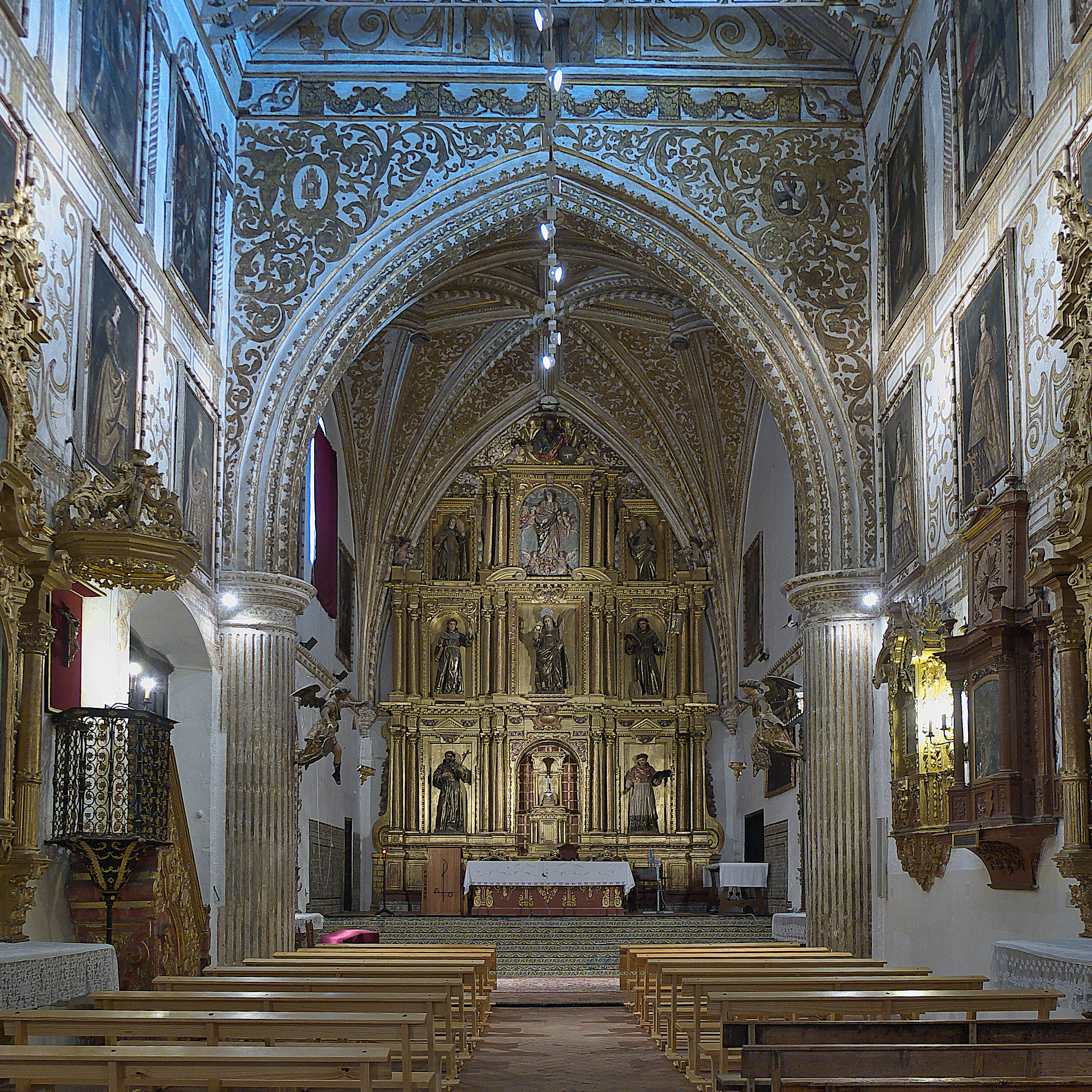 Doña Leonor Pacheco, abadesa del monasterio (1486), hija de don Juan, maestre de la Orden de Santiago, Marqués de Villena; y su hermana Beatriz, Duquesa de Arcos, contibuyen con su patrimonio al engrandecimiento de este monasterio (1511).